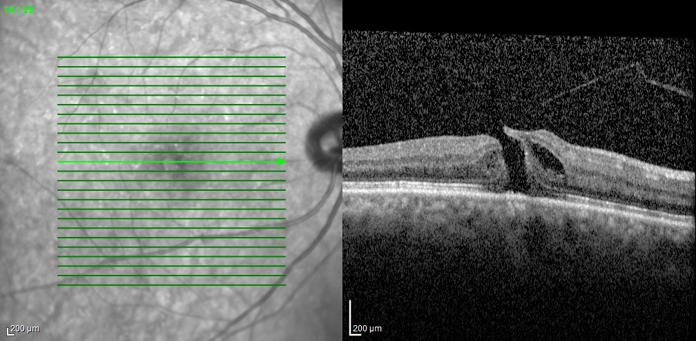 חור מקולרי בעין ימין